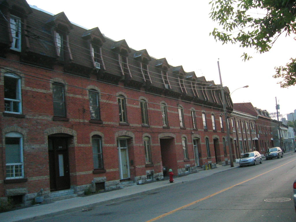 rue De la Montagne, Griffintown, Montréal (Québec)